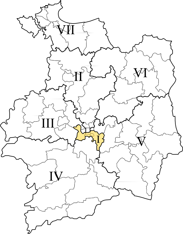 Carte de la première circonscription d'Ille-et-Vilaine